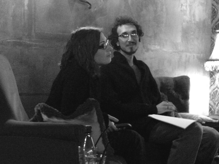 Déborah Heissler et Jacob Bromberg au Café Delaville, pour Ivy Writers Paris (printemps 2013).